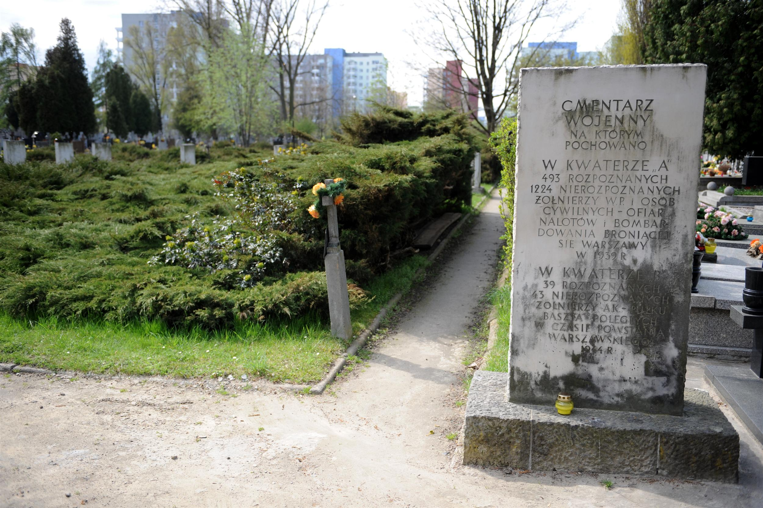 Kwatery wojenne na cmentarzu na Służewie przy ul. Wałbrzyskiej w Warszawie